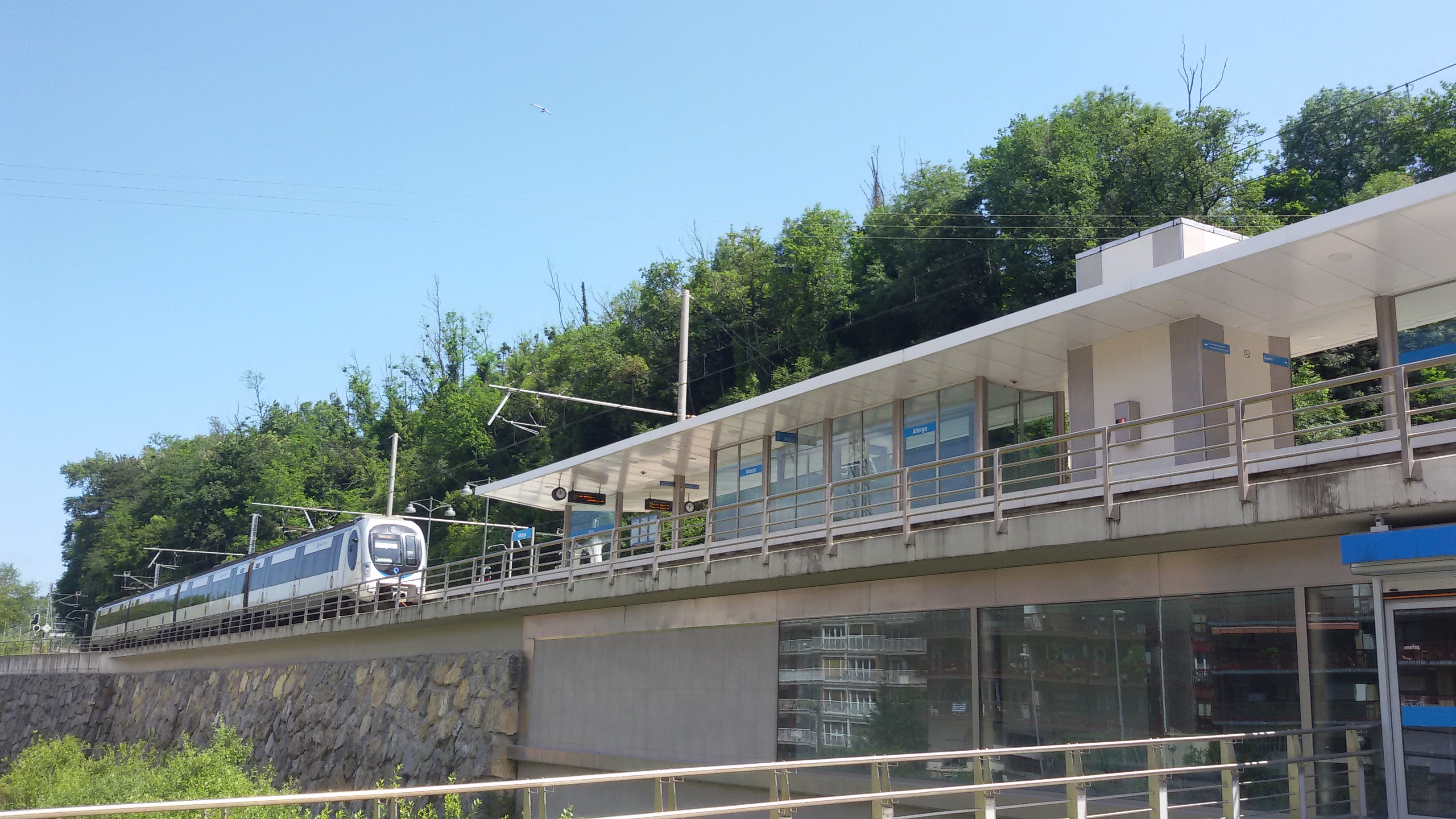 Tren del metro de Donostialdea alejándose por vía oeste de la estación de Añorga, perteneciente a Euskotren